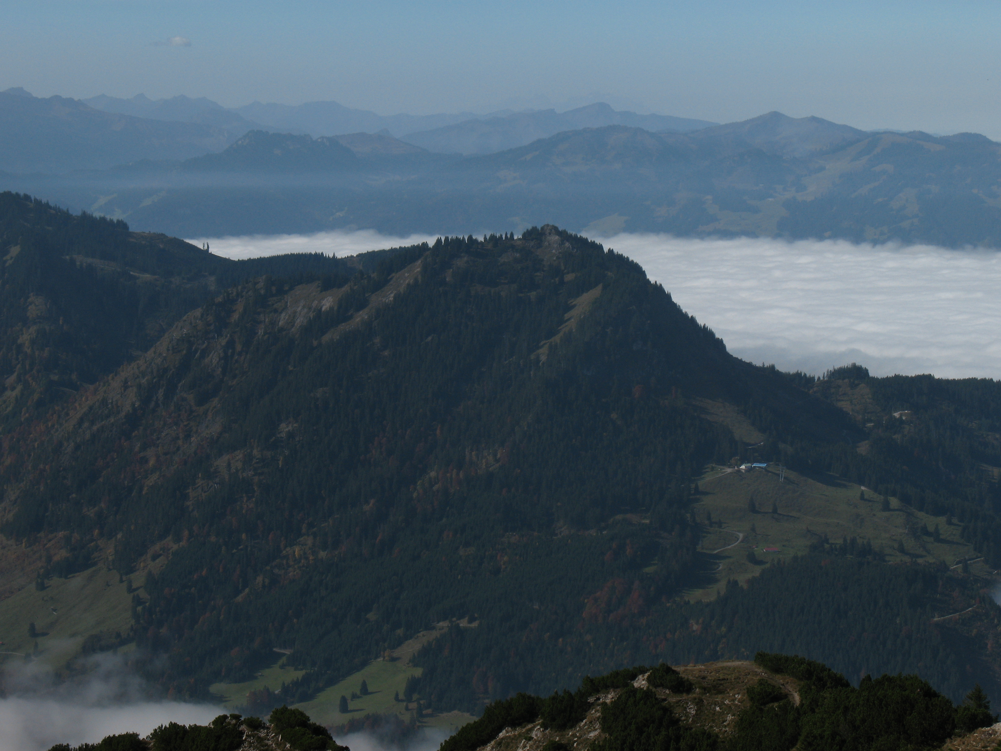 Blick vom Iseler (1876 m) auf das Imberger Horn (1655 m).